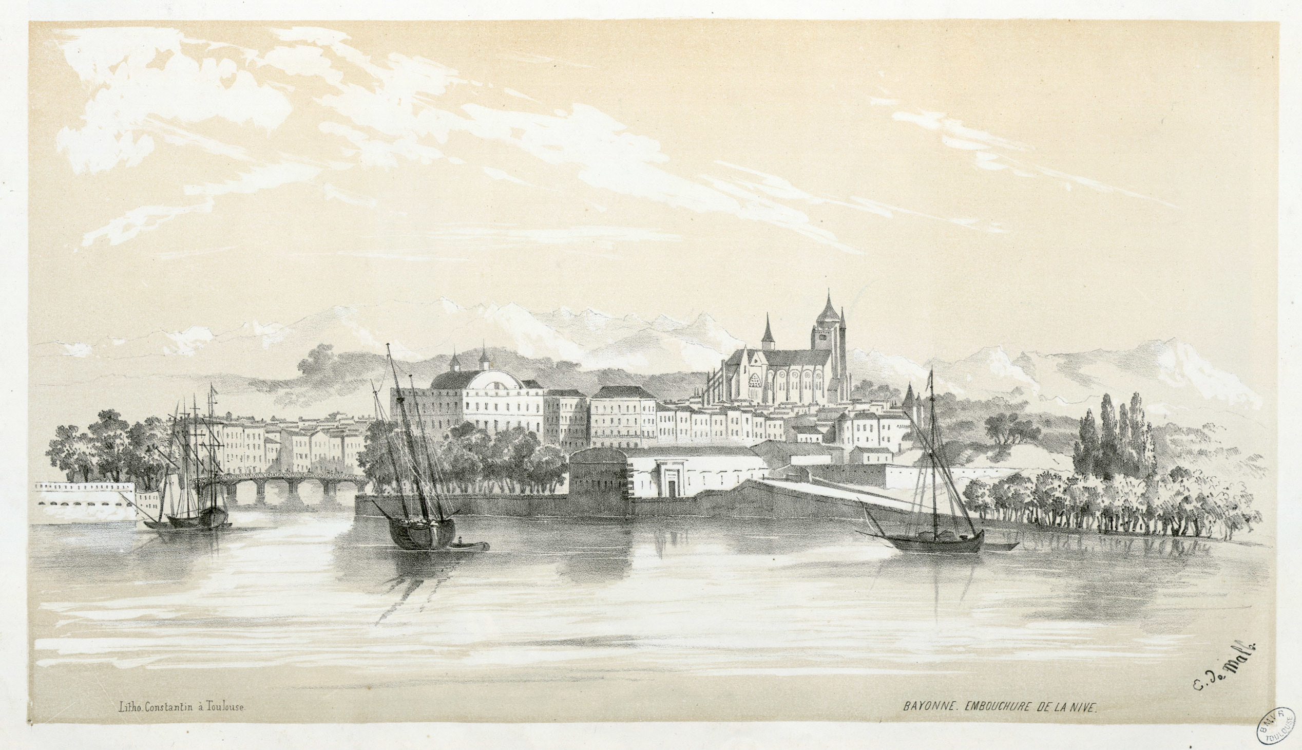 Fait partie d'un recueil de 15 planches lithographiées en camaïeu avec titre lithographié Ancely, René (1876 - 1966). Possesseur